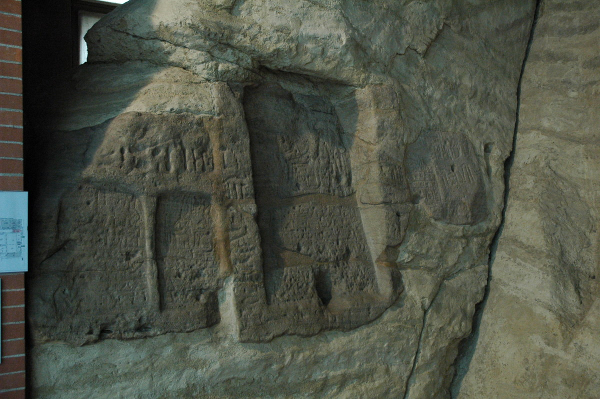 Tempel von Ellesija, ursprünglich von Thutmosis III. in Unternubien bei Qasr Ibrim errichtet, heute im Museo Egizio in Turin